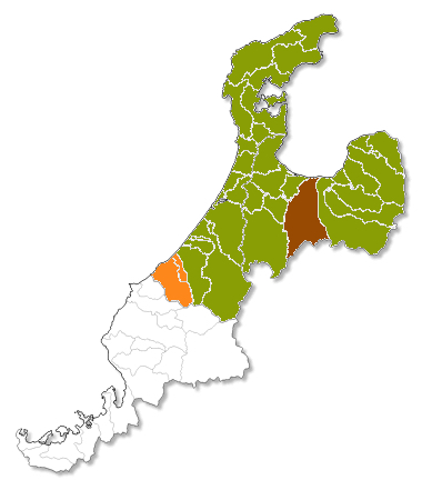 Map of Kaga, Toyama and Daishoji domains in late Tokugawa period Japan